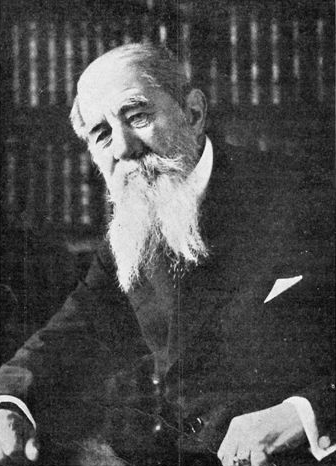 Milan Jovanović Batut, Serbian physician